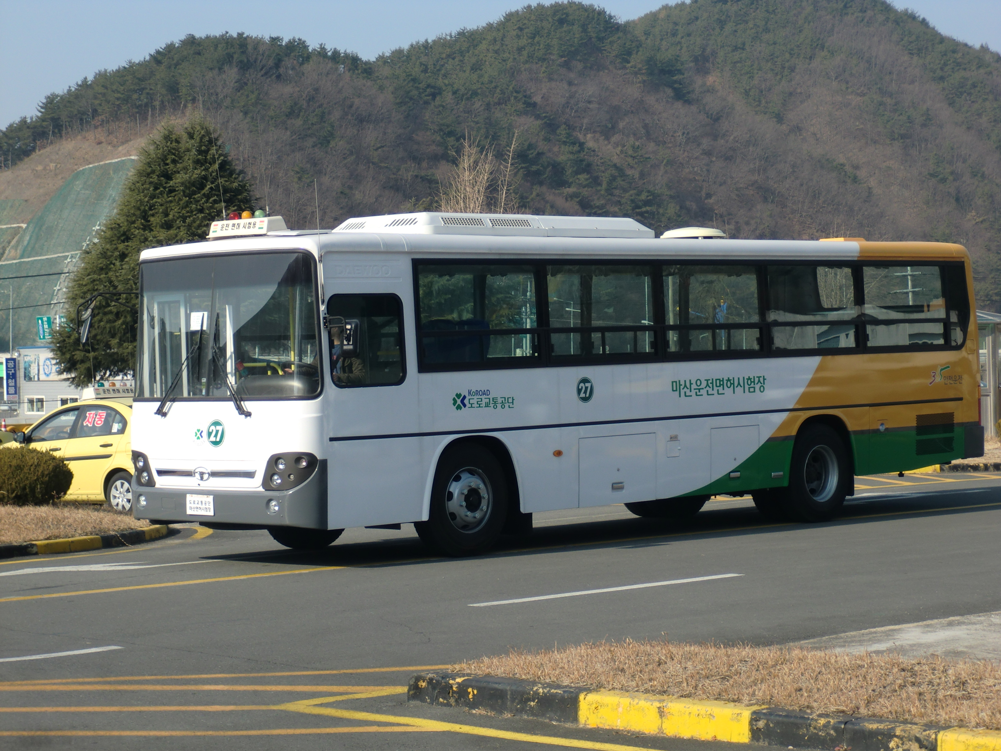 마산운전면허 시험장의 대형면허 장내기능시험용차량 대우버스 BS106